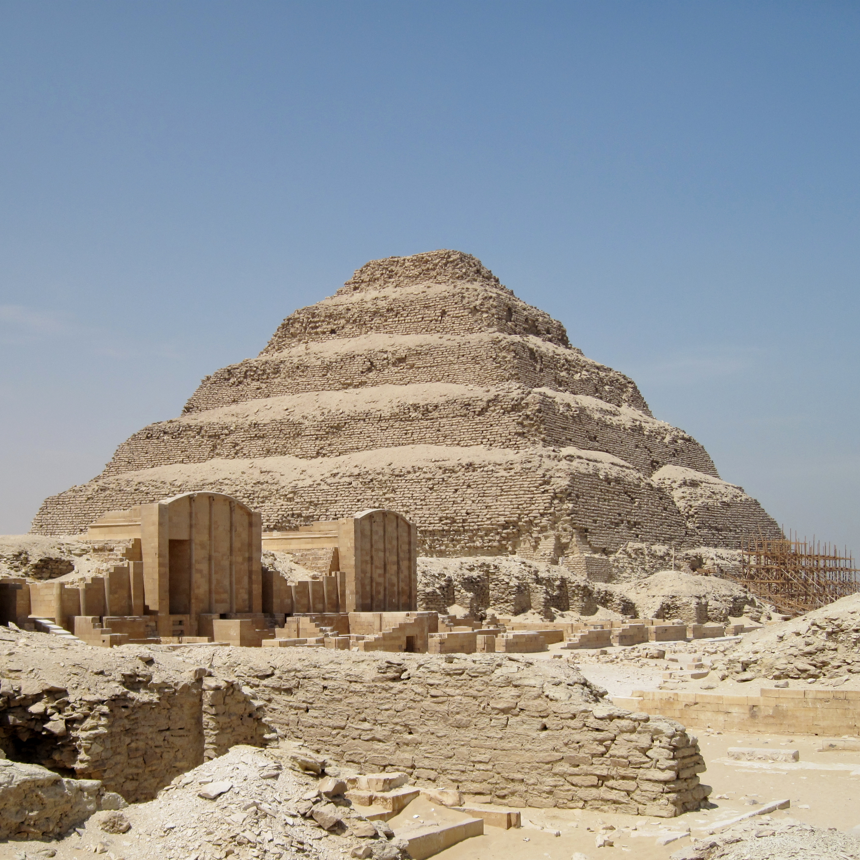 Stufenpyramide des Pharao Djoser aus der 3. Dynastie des Alten Reiches in Ägypten (um 2670 v. Chr.)